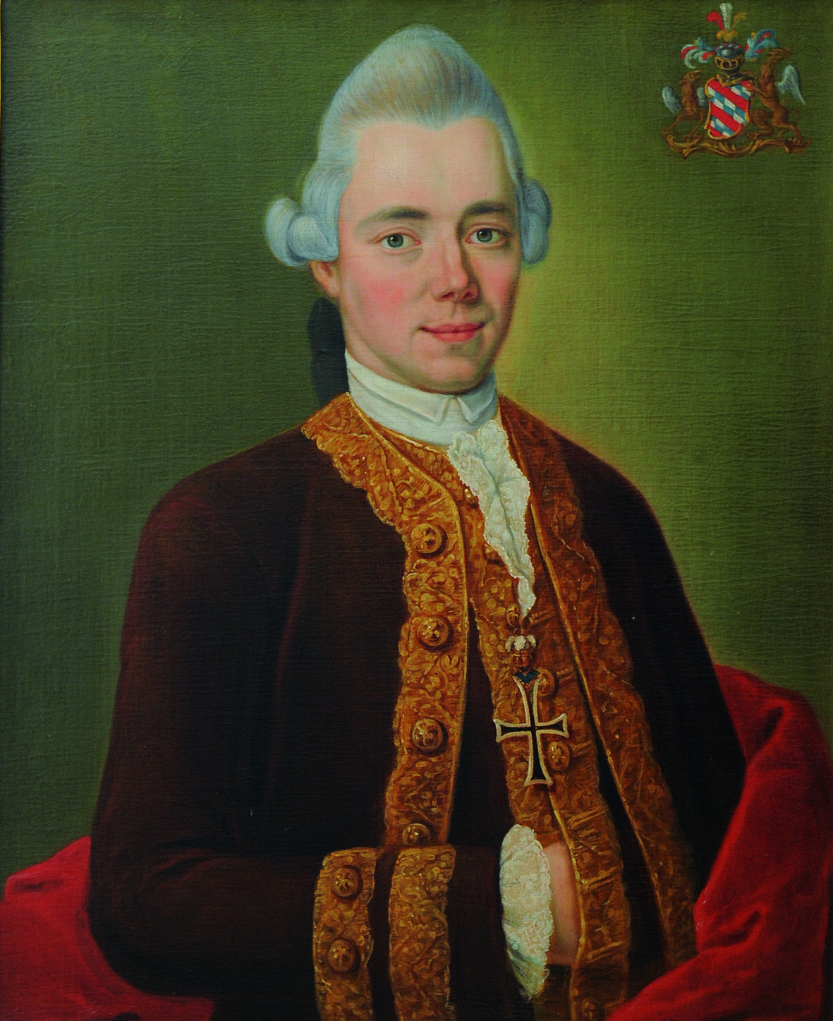 Portret van Frederik Gijsbert van Dedem (1743-1820)